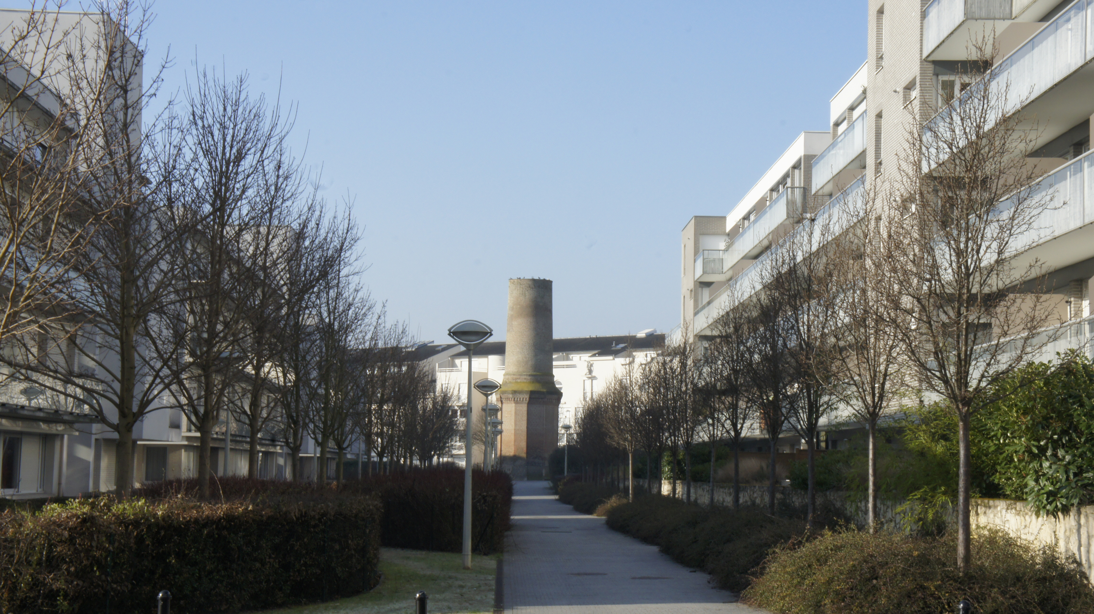 Clairmarais quartier rénové laissant apparaitre son ancine patrimooine industriel, ici une ancienne cheminée .